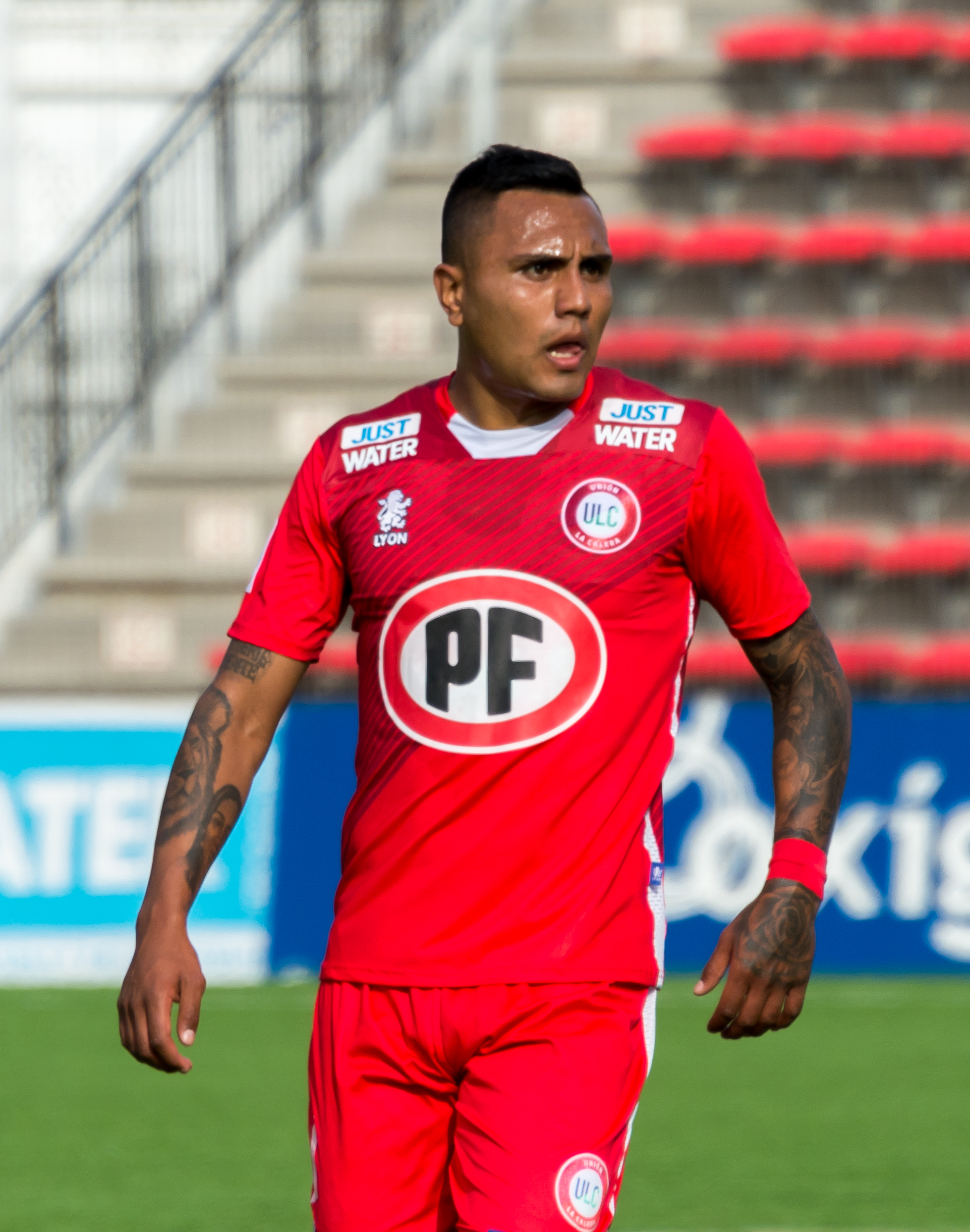 Juan Leiva, Unión La Calera v Colo-Colo, Estadio Municipal Nicolás Chahúan Nazar, La Calera, Región de Valparaíso, Chile.